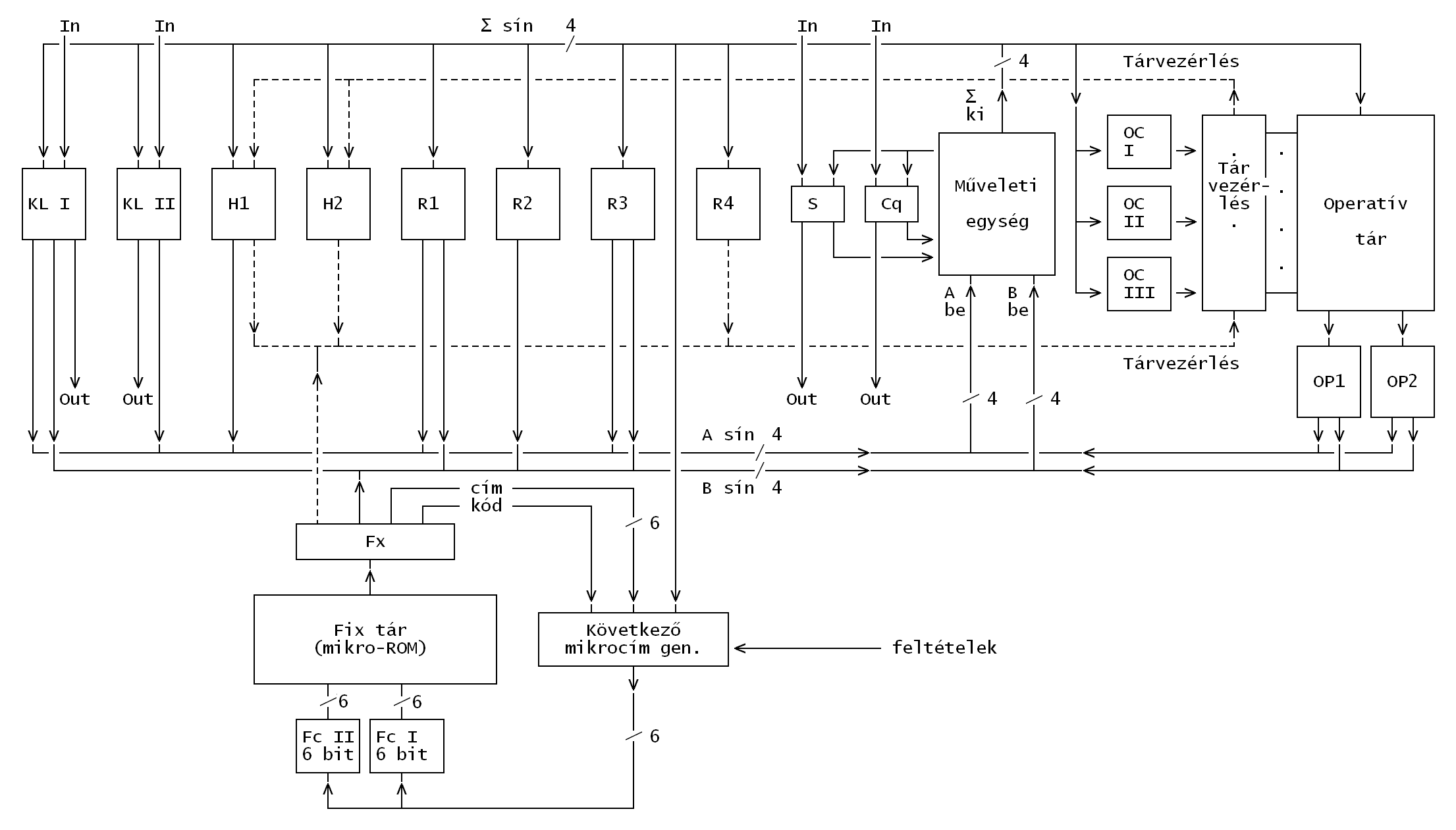 A magyar gyártmányú, mikroprogramozott EMG–666 számológép regiszterei, adatútjai, vezérlési sémája.